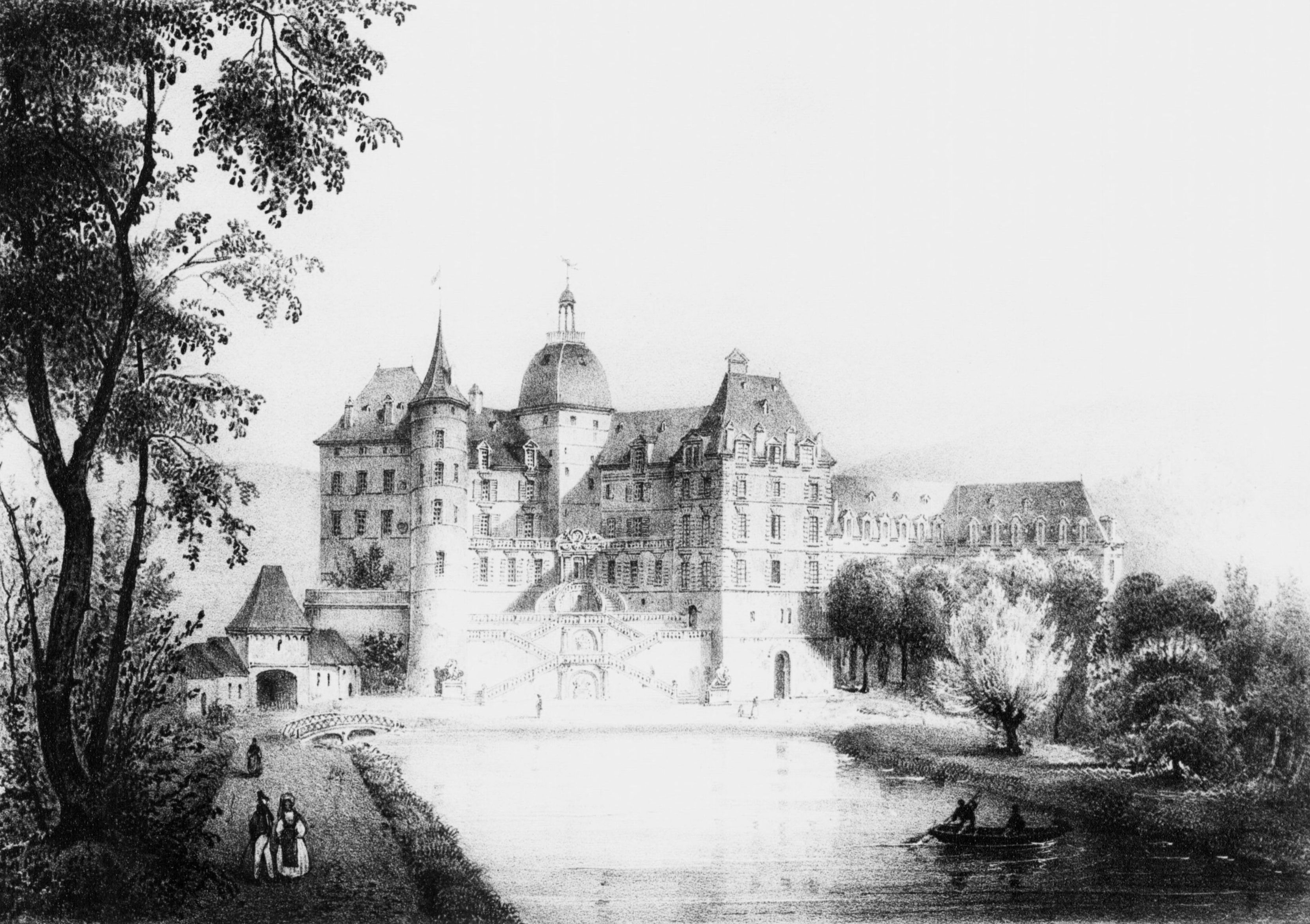 Album du Dauphiné, ou Recueil de dessins représentant les sites les plus pittoresques du Dauphiné.